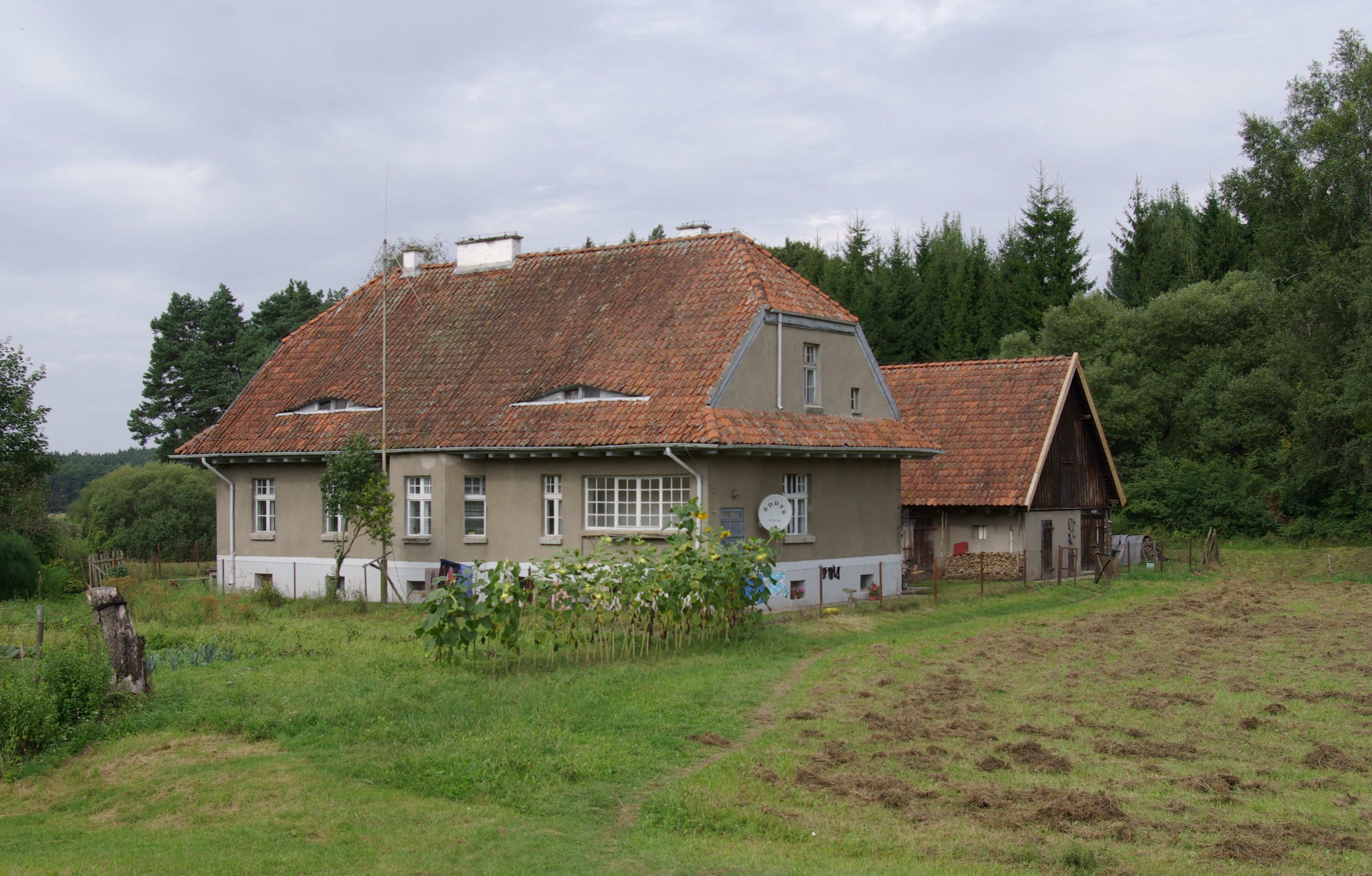 Kanał Mazurski, Śluza Piaski (Guja)